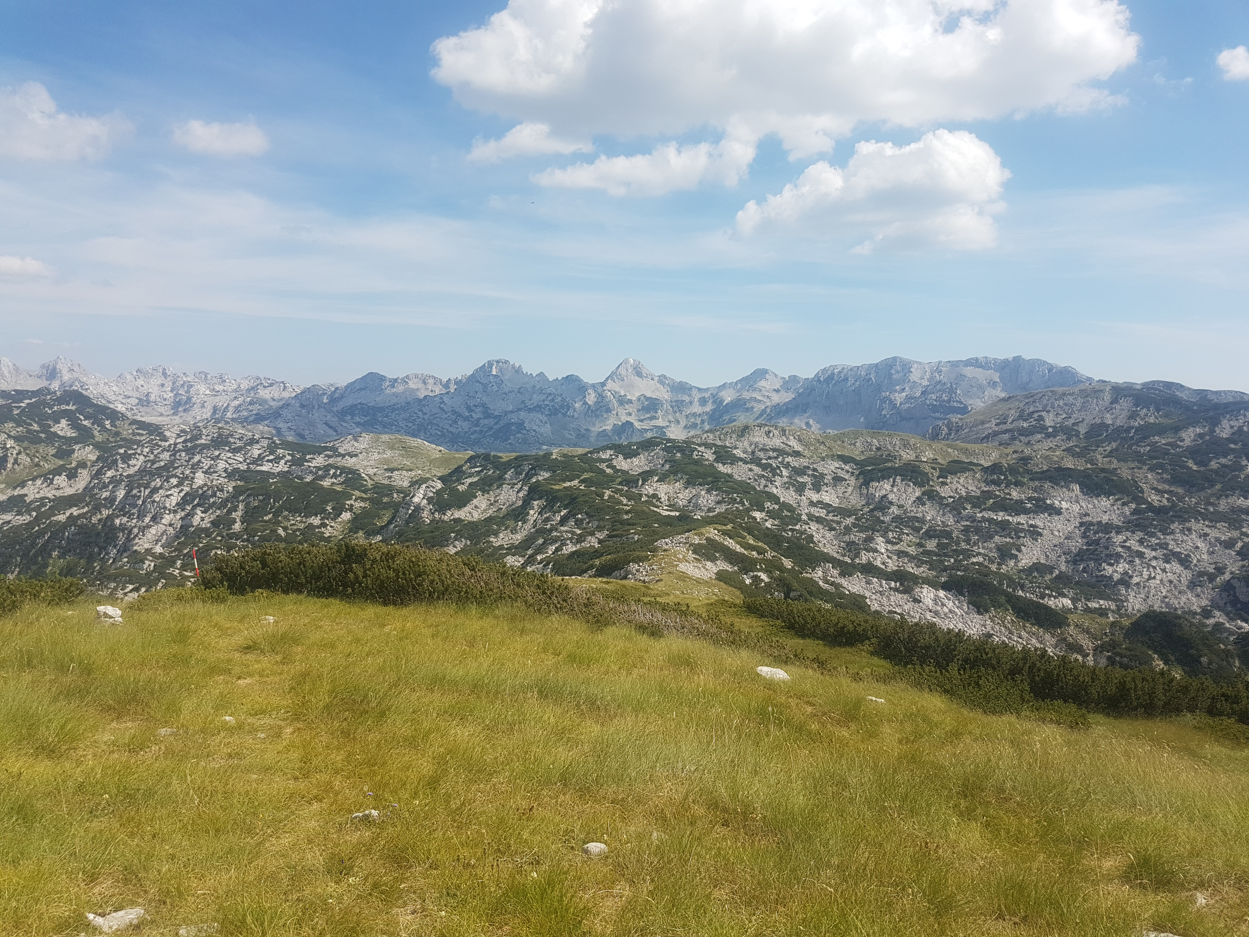 Pogled sa vrha Cetina.